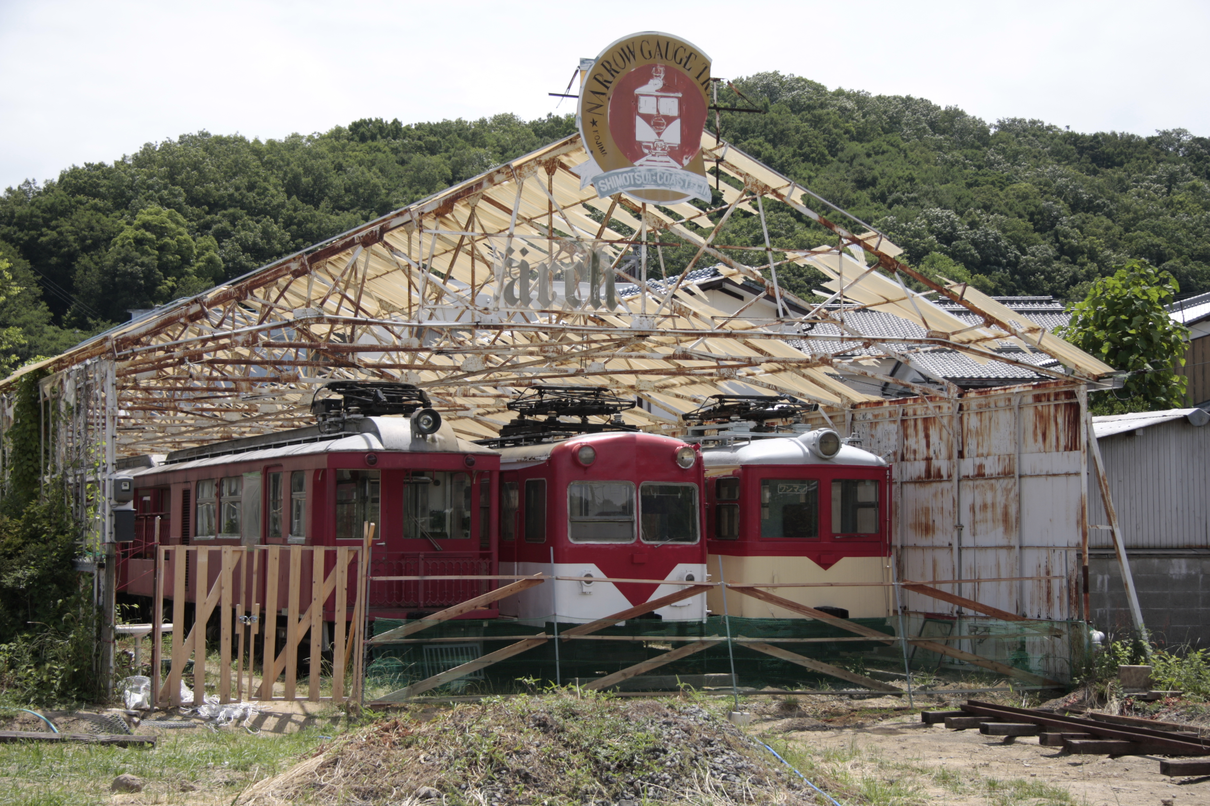 下津井電鉄下津井駅跡に留置されている車両群